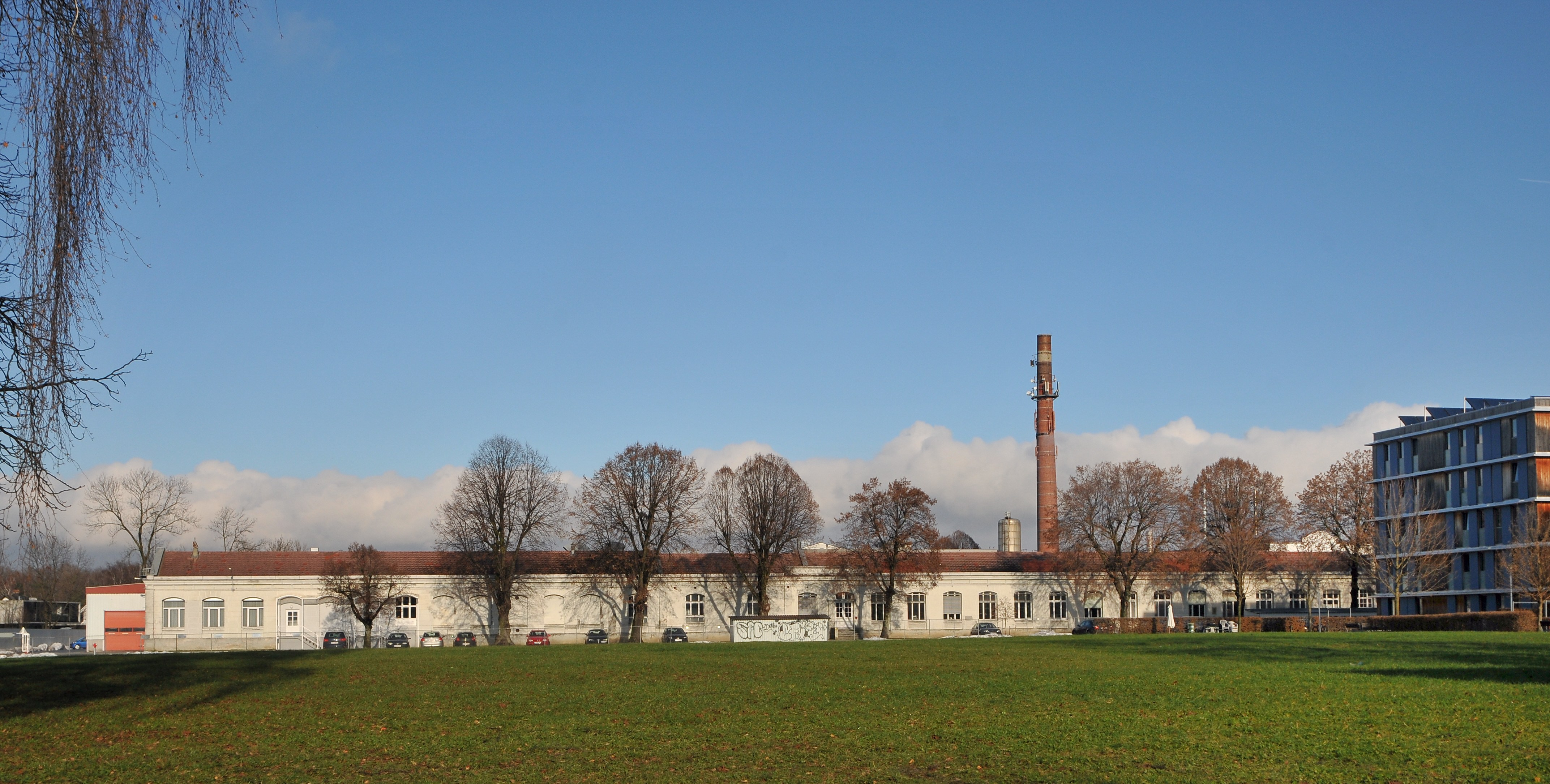 aus dem DEHIO Vorarlberg 1983: Spinnereistraße, Nr. 1/3, 5/7, 9, 10 in Hard: Vorarlberger Kammgarnspinnerei, Ensemble aus Fabriksgebäude und Arbeiterwohnhäusern. Spinnereigebäude erbaut nach Plan von C.Sequin-Bronner, 1896, erweitert von Josef Schöch, 1909; eingeschossiger Bau mit langgestreckter repräsentativer Front, Spinnereisaal in Eisenkonstruktion. Arbeiterwohnhäuser erbaut 1910/11 und 1924/25; zwei Zeilen aus 2-geschossigen Mehrfamilienhäusern in Verband mit Holzgatter und Nutzgärten. Daneben Mädchenheim, erbaut 1910, und Meisterhäuser. Nr. 12 (heute Achtraße 17): Villa, Heimatstil, Kreuzgiebel mit Fachwerk, gebändertes Erdgeschoß, Jugendstiltüre.